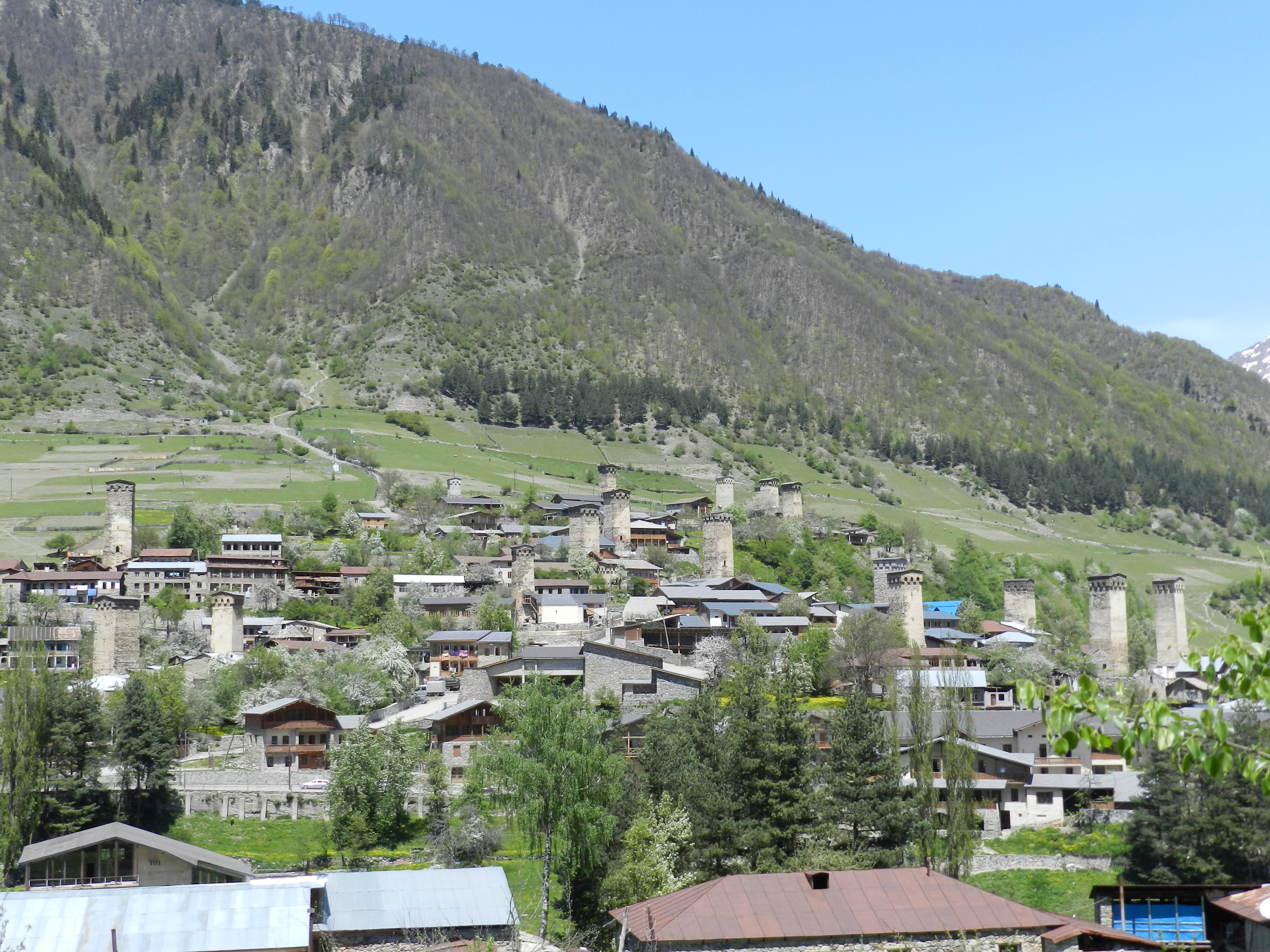 Mestia mit ortstypischen Wehrtürmen und modernen Häusern im alpenländischen Stil